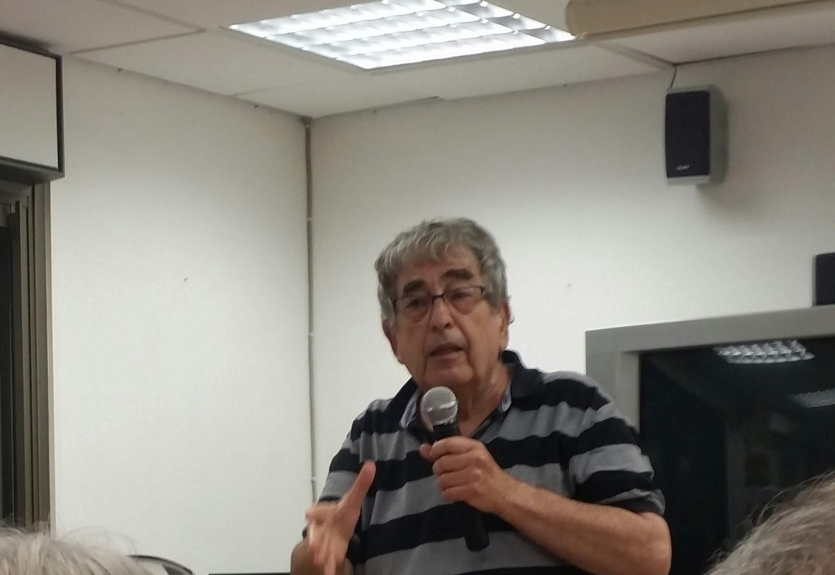 הסופר חיים באר בהרצאה במשרדי העמותה לתולדות חיפה במשרדיה ברחוב אלנבי במושבה הגרמנית